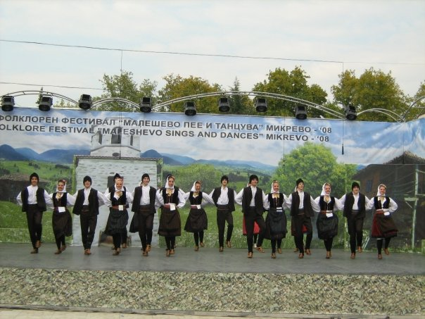 Международен фолклорен фестивал „Малешево пее и танцува“ (2008) в с. Микрево, община Струмяни, област Благоевград. Състав от гр. Нова Пазова, Сремски окръг играе танц от района на гр. Лесковац, Ябланишки окръг, Сърбия. Srpskohrvatski / српскохрватски: Međunarodni festival Mikrevo 2008 (Bugarska, Oblast Blagoevgrad, Opština Strumjani, Mikrevo). Igra KUD "Mladost", Nova Pazova.